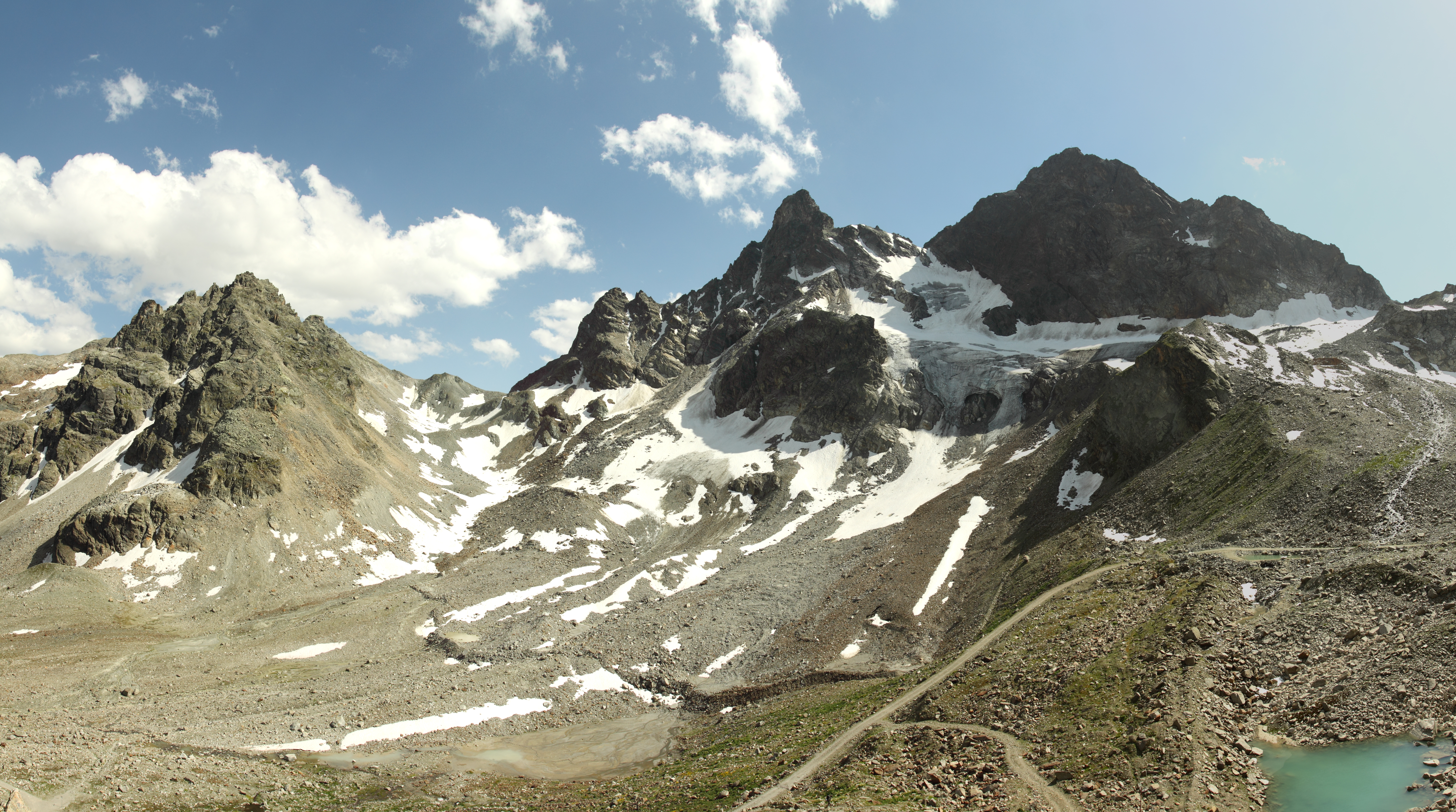 Blick von der Saarbrücker Hütte auf die Litznergruppe mit Sattelkopf, Litznersattel, Großlitzner und Großes Seehorn (von links)